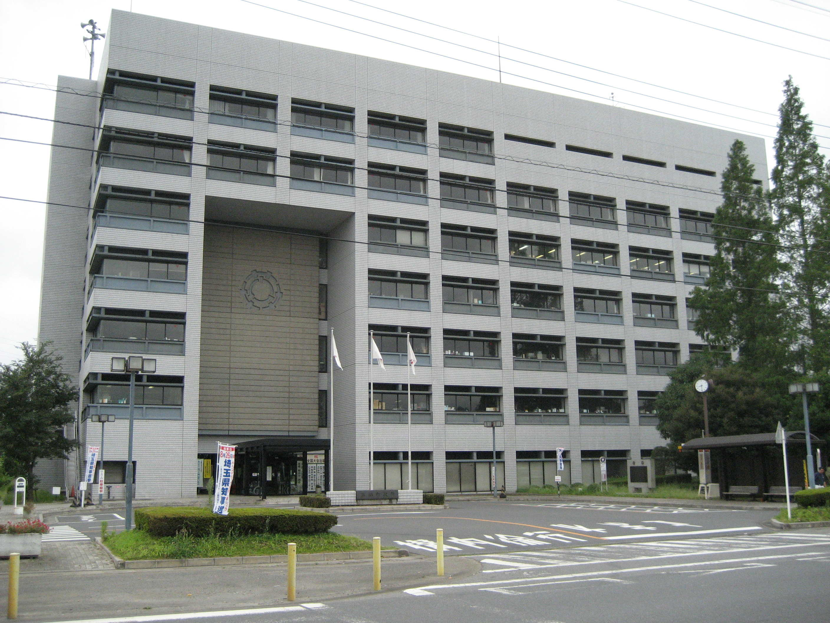 三郷市役所正面